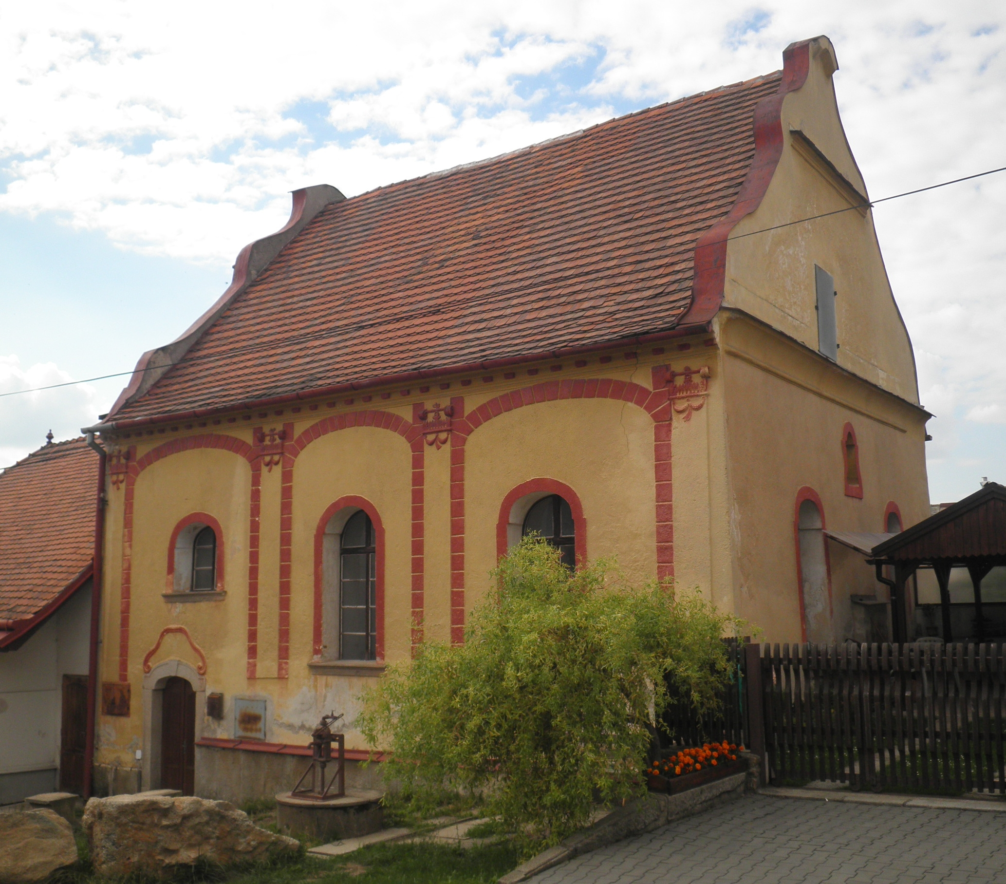 Bývalá synagoga v Batelově.